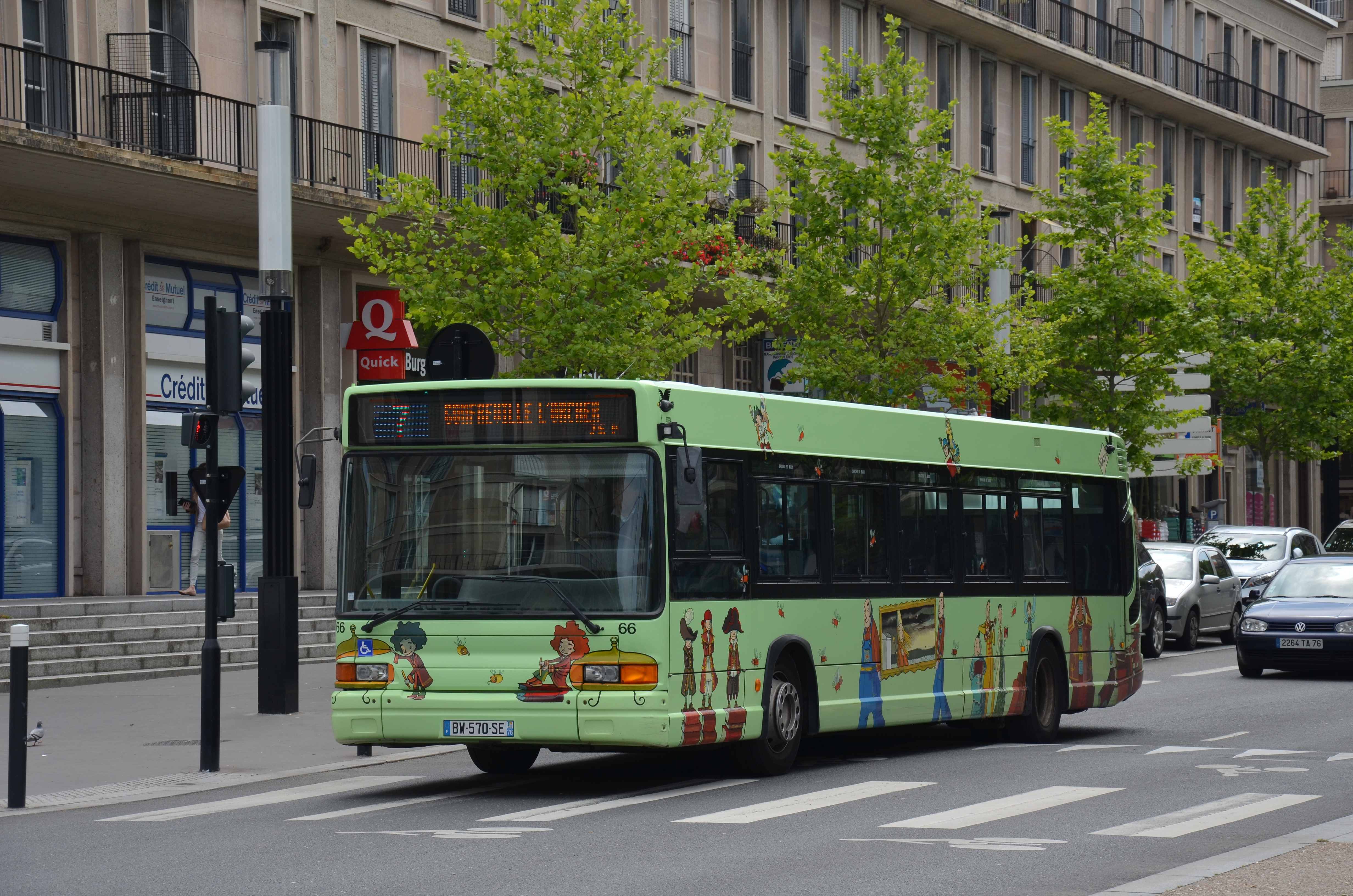 Heuliez GX 317 n°66 sur la ligne 7 du réseau LiA, près de l'Hôtel de Ville du Havre.